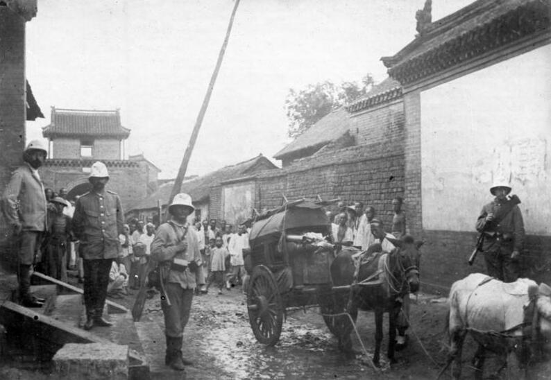 Schutztruppe Kiautschou 1899: Expedition unter Hptm. Mauve; Besetzung Kaumi´s